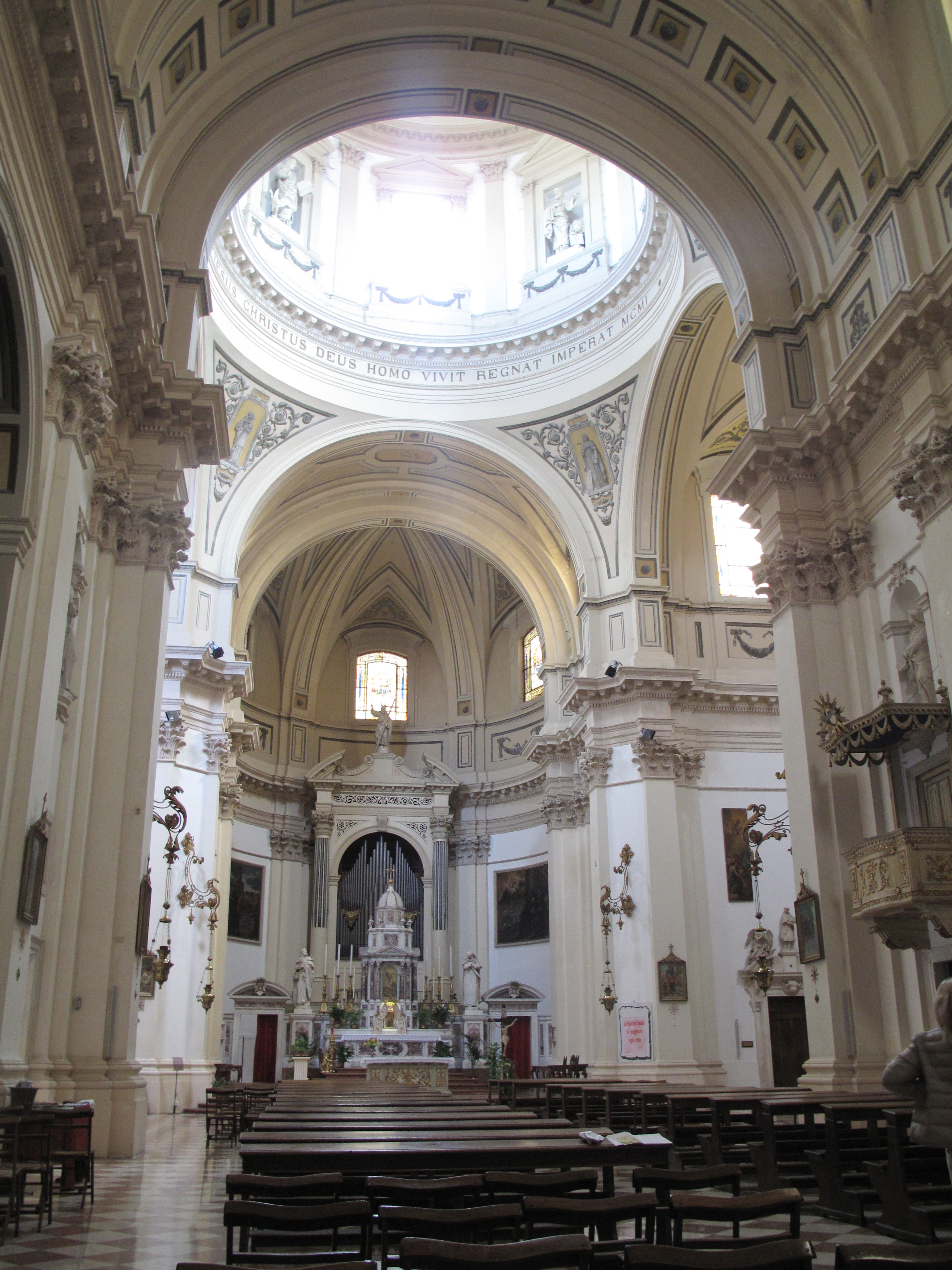 Vicenza - Chiesa di Santo Stefano, altare maggiore